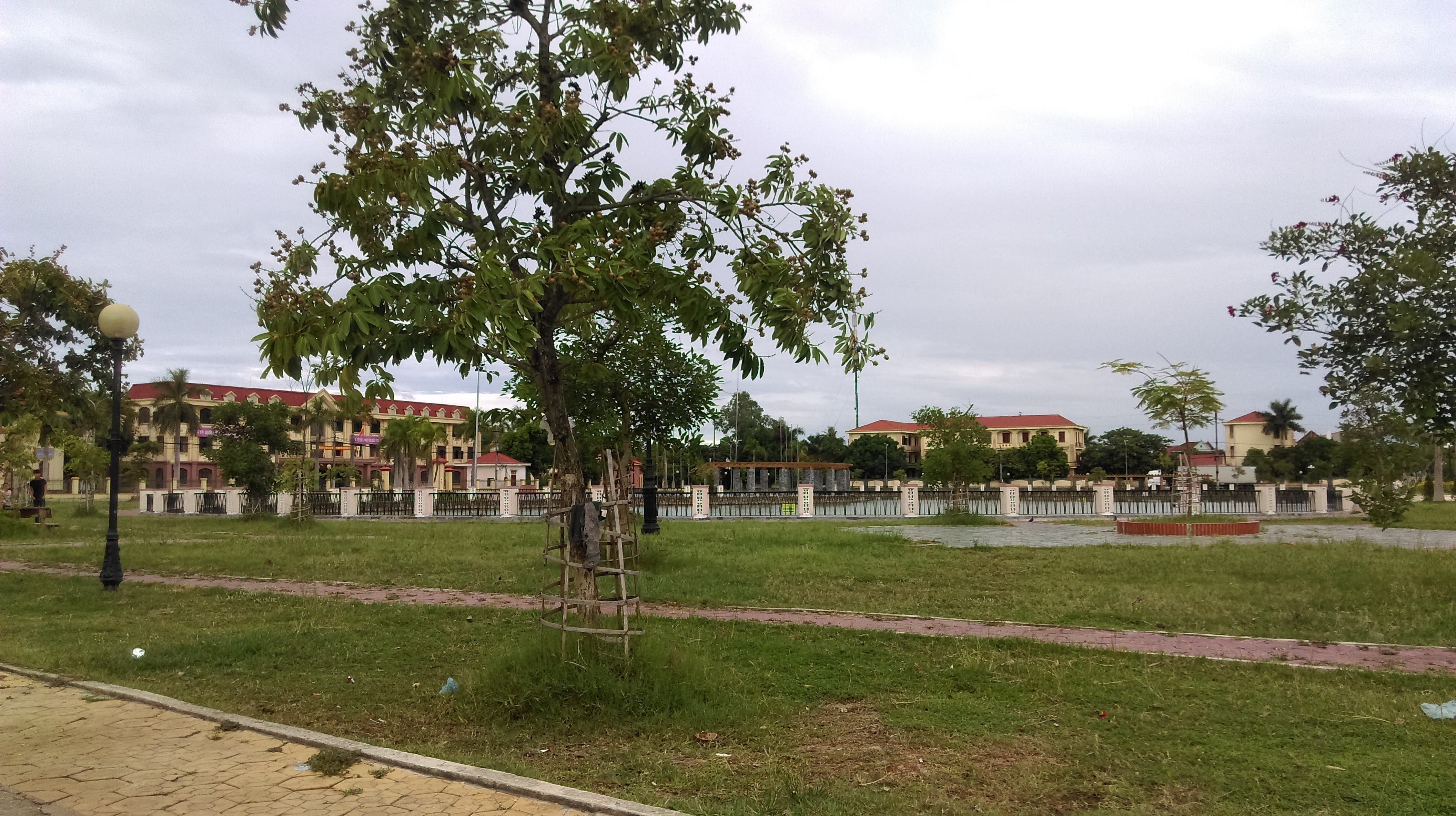 UBND huyện Can Lộc, Hà Tĩnh